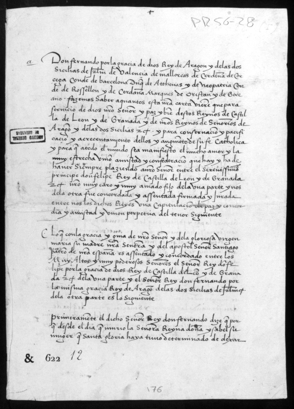 Texto de la Concordia de Villafáfila, versión de Fernando II